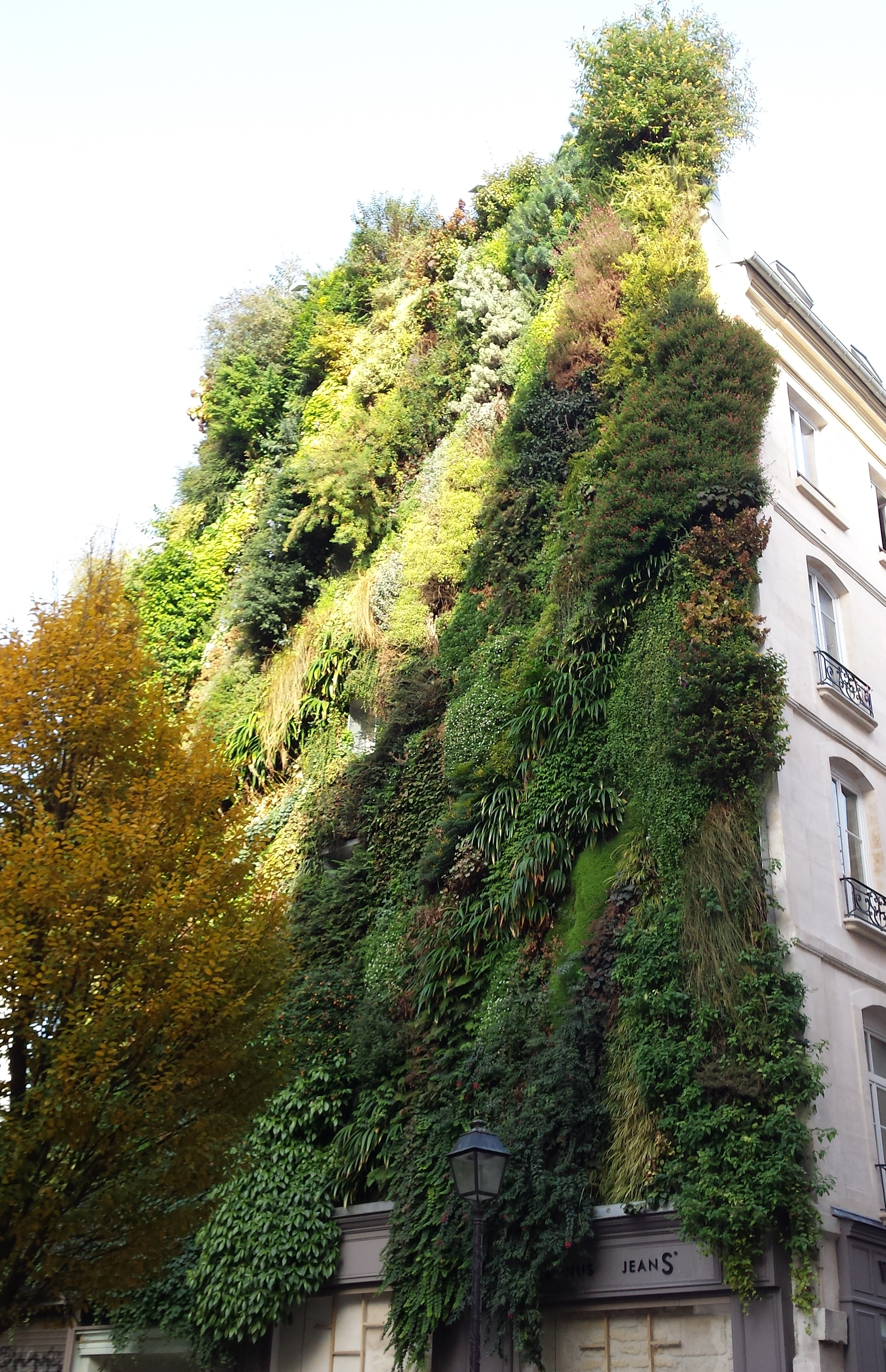 Mur vegetal a París (segon arrondissement)